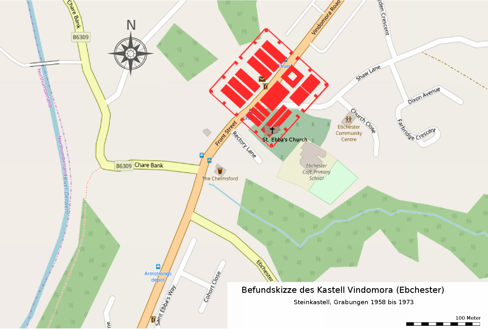 Befundskizze des Kastell Vindomora, 2.- 4.Jahrhundert n.Chr., Ebchester (GB)